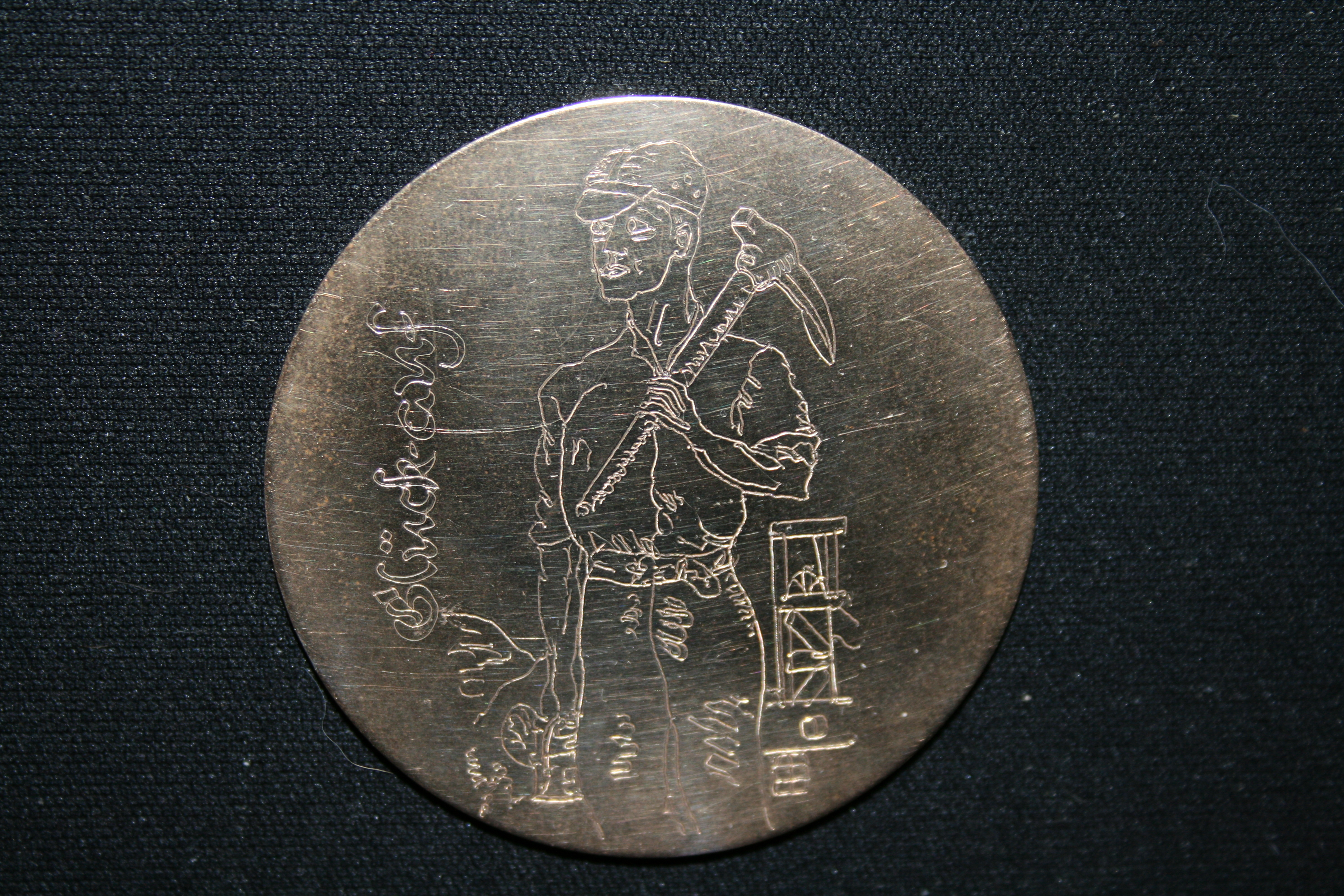 Gedenkmedaille Schließung HW Vorderseite